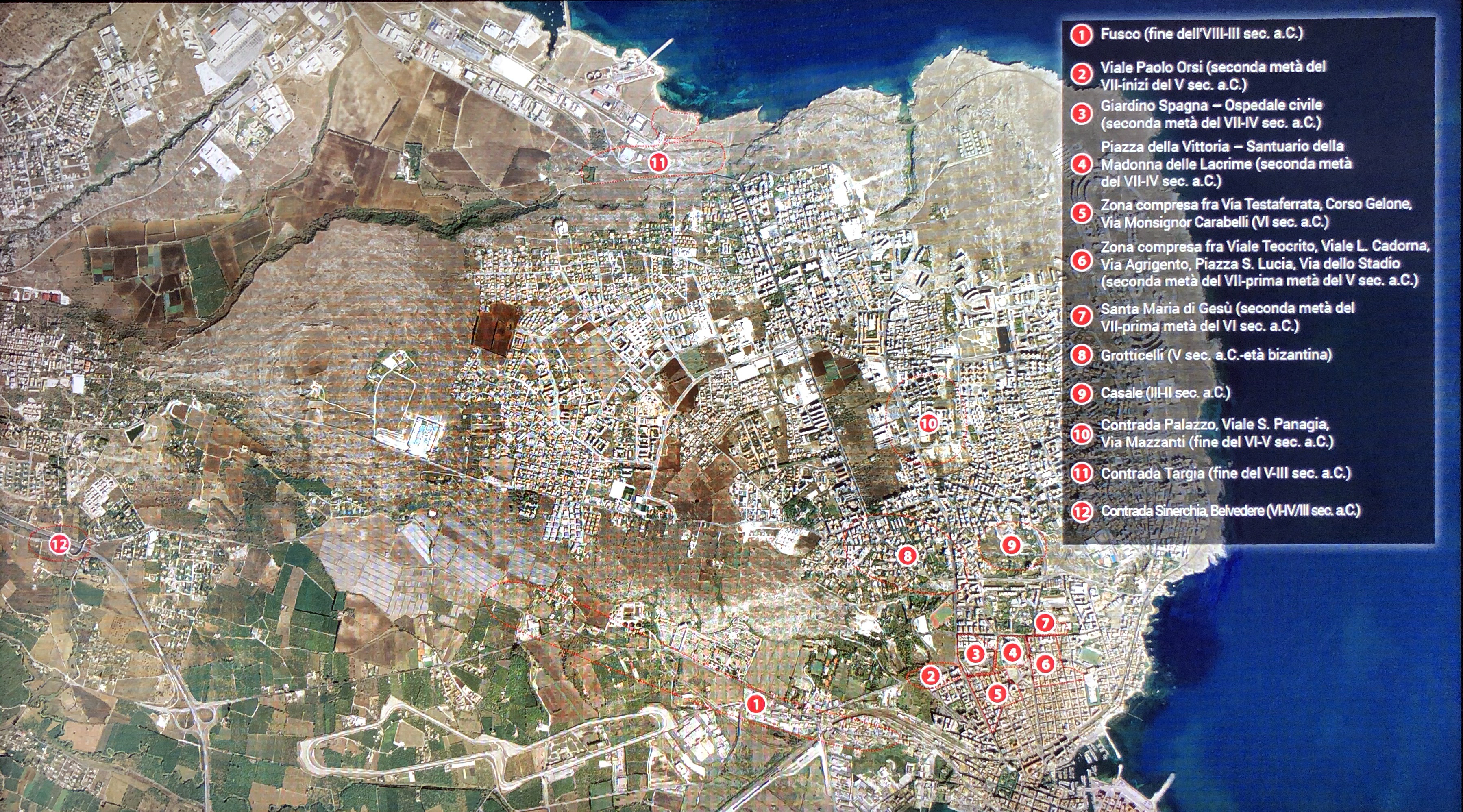 Ubicazione delle necropoli di Siracusa